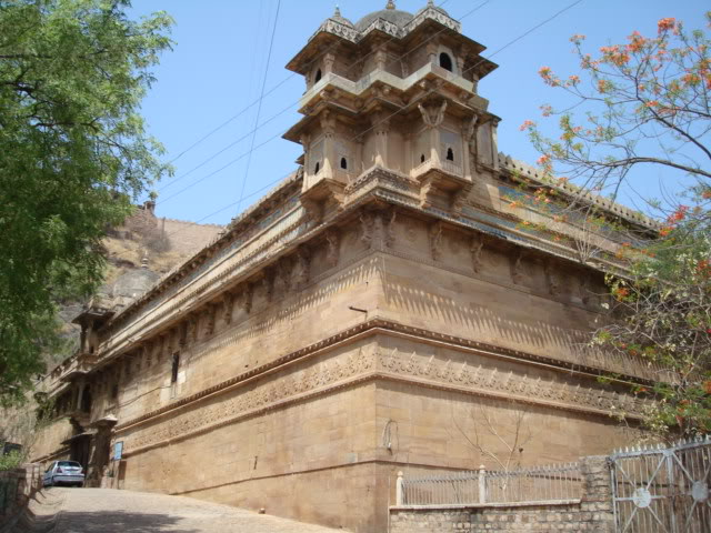 Gujari Mahal Gwalior